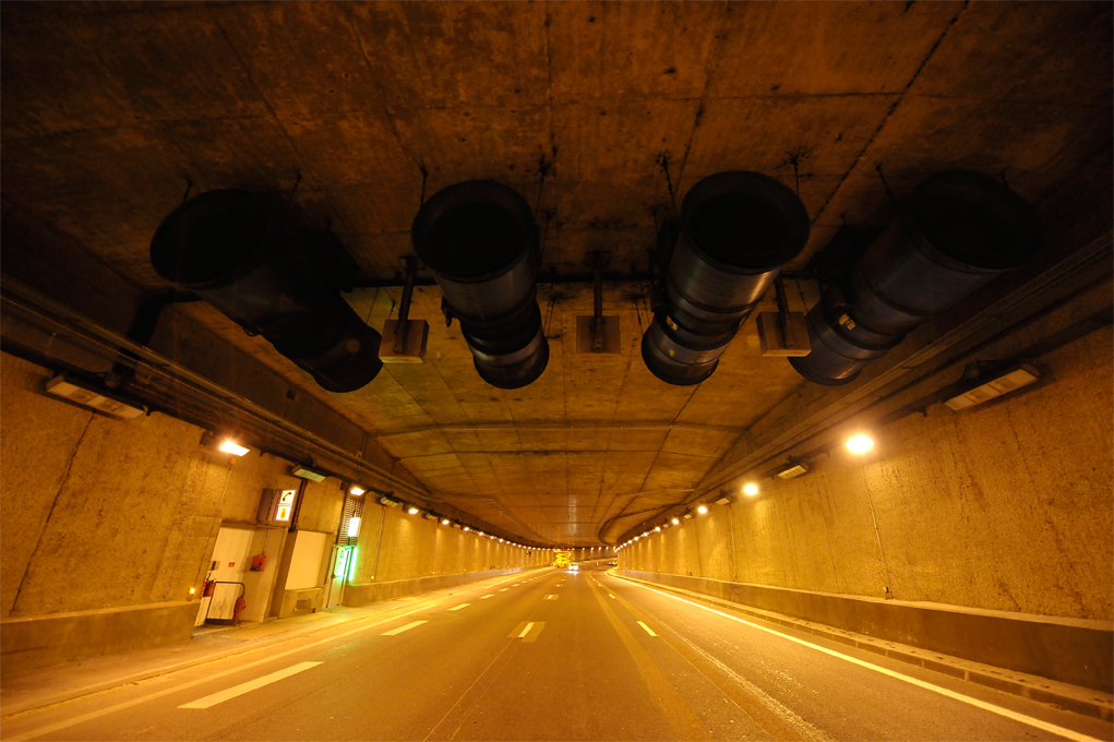 Ventilation